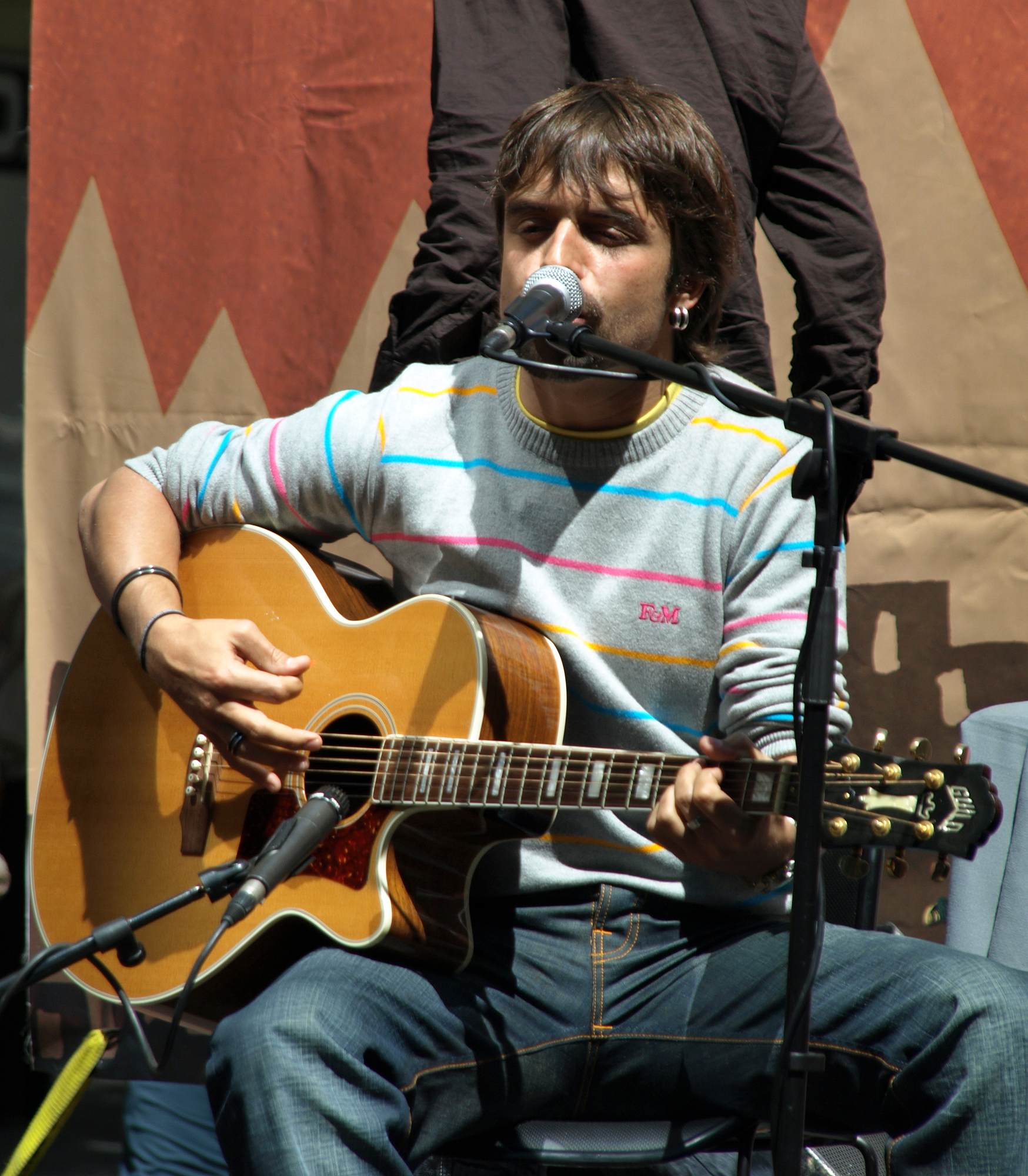 Manu Guix compositor, director musical e intérprete español.